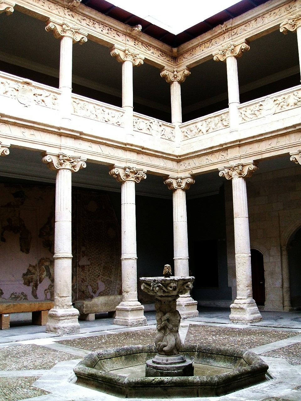 Casa de Miranda (Museo de Burgos), patio renacentista. Habilitada como sede del Museo de Burgos